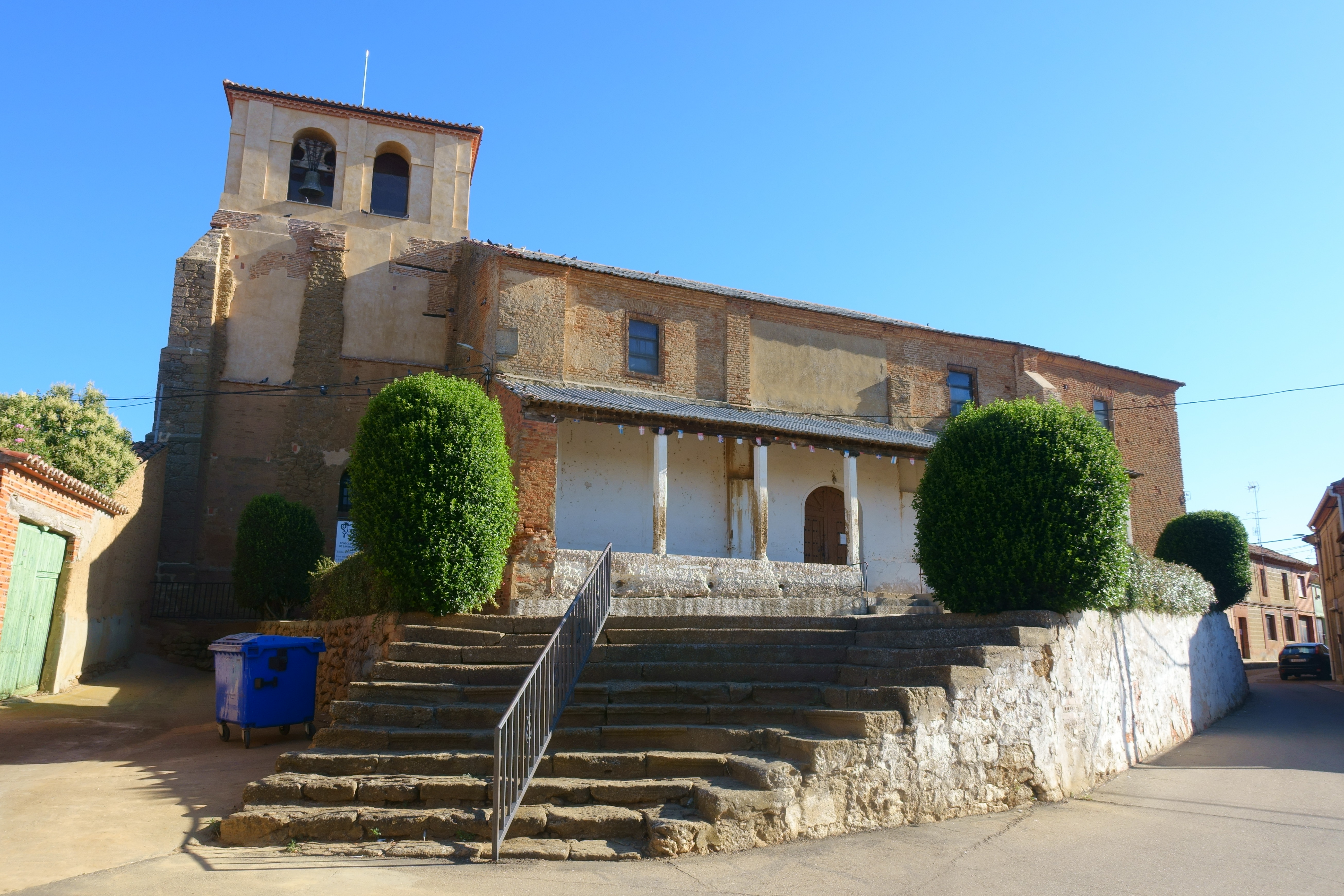 Iglesia de San Miguel, San Miguel del Valle (Zamora, España).